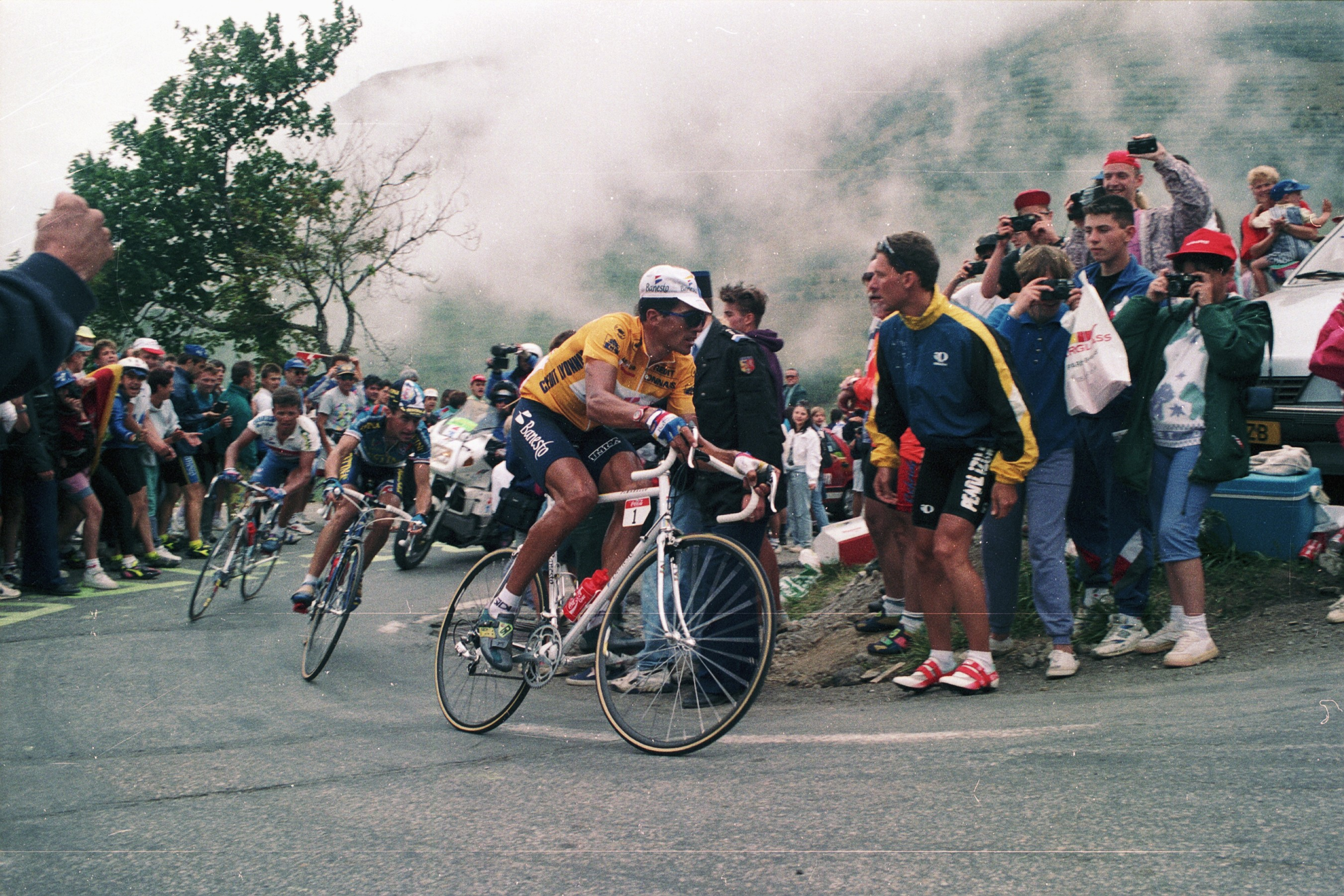 Tour de France 1994, 21 July, Tour de France 1994, 19 July, Valréas - L'Alpe d'Huez, Vladimir Poulnikov, Luc Leblanc and Miguel Indurain.